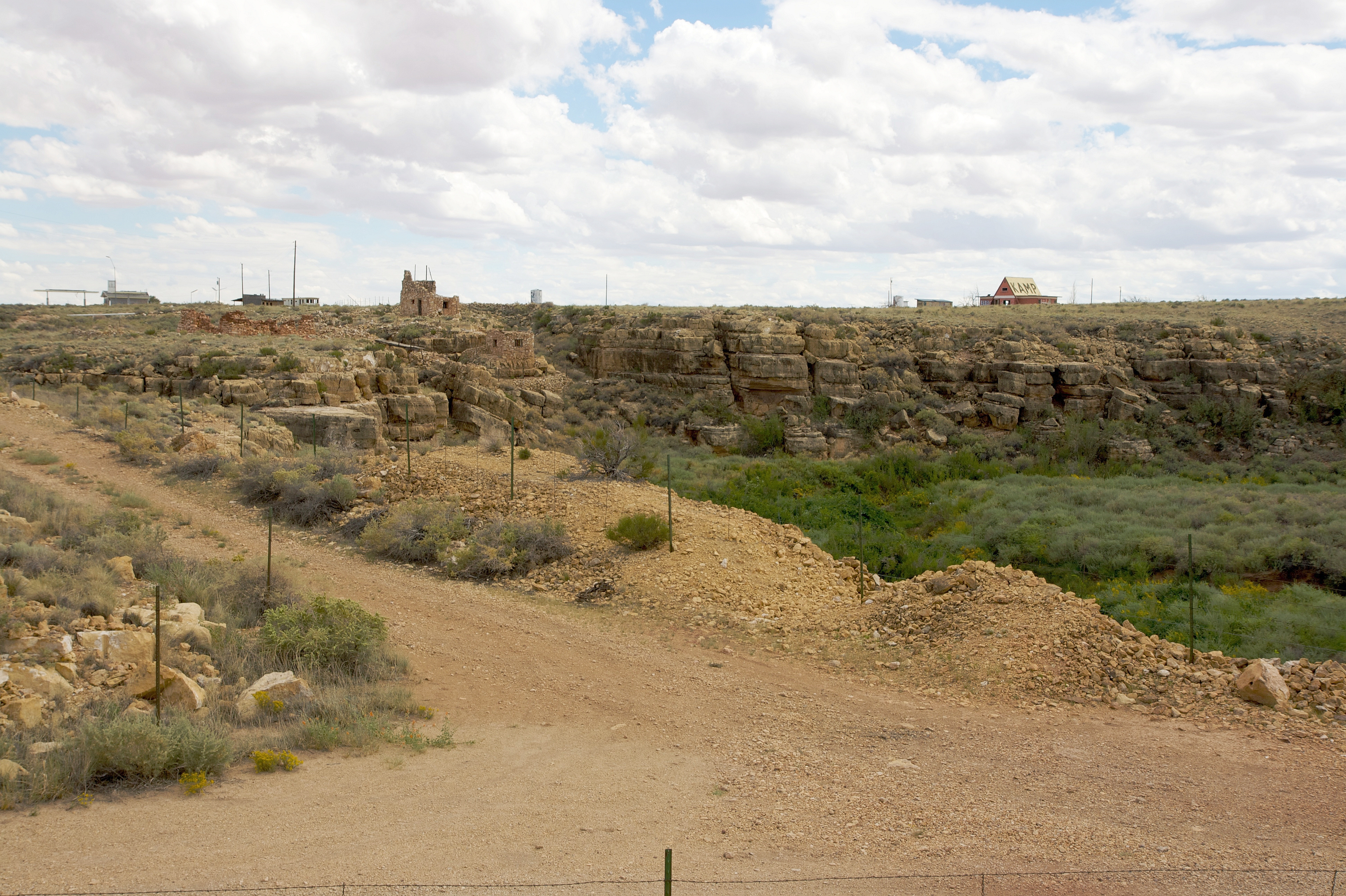 Two Guns, Arizona.